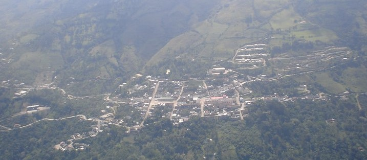 SAN JOSE DE ALBAN